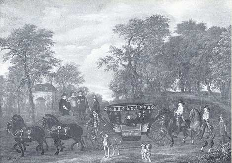 Cornelis de Graeff, zijn echtgenote Catharina Hooft en hun zonen Pieter en Jacob de Graeff, de staande figuren zijn v.l.n.r. Willem Schrijver, Pieter Trip en Andries de Graeff